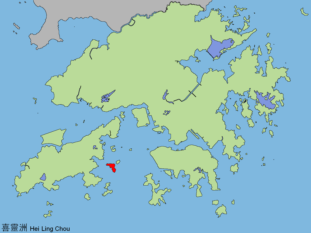 中文（香港）: 喜靈洲。